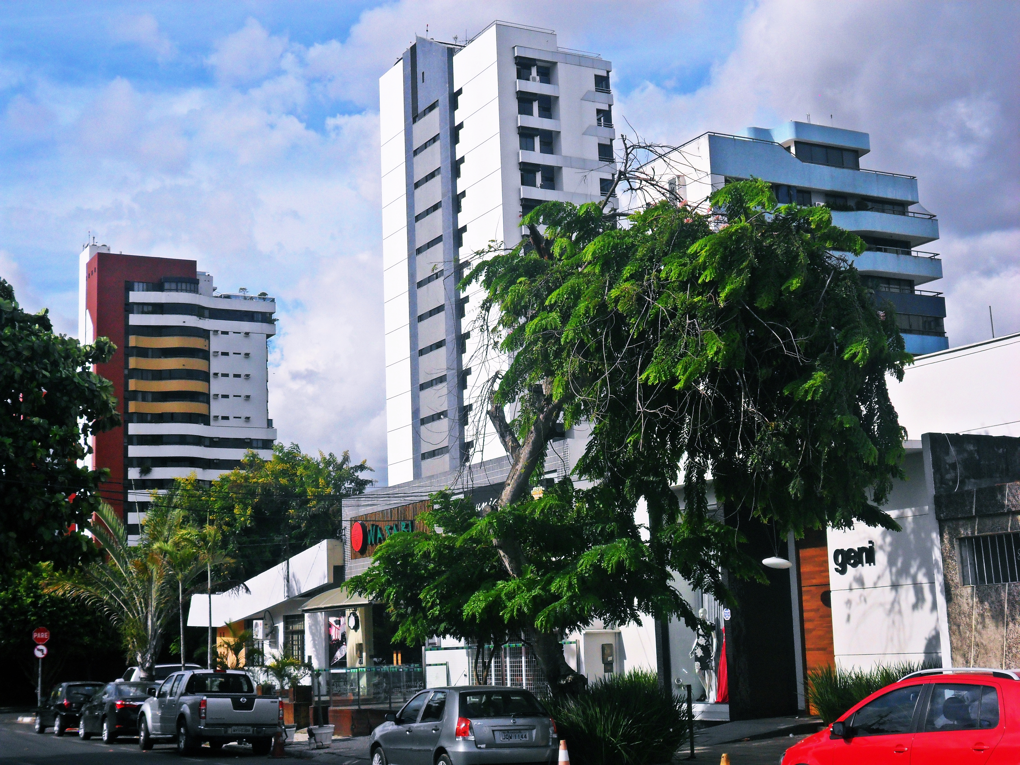 Kalilandia bairro